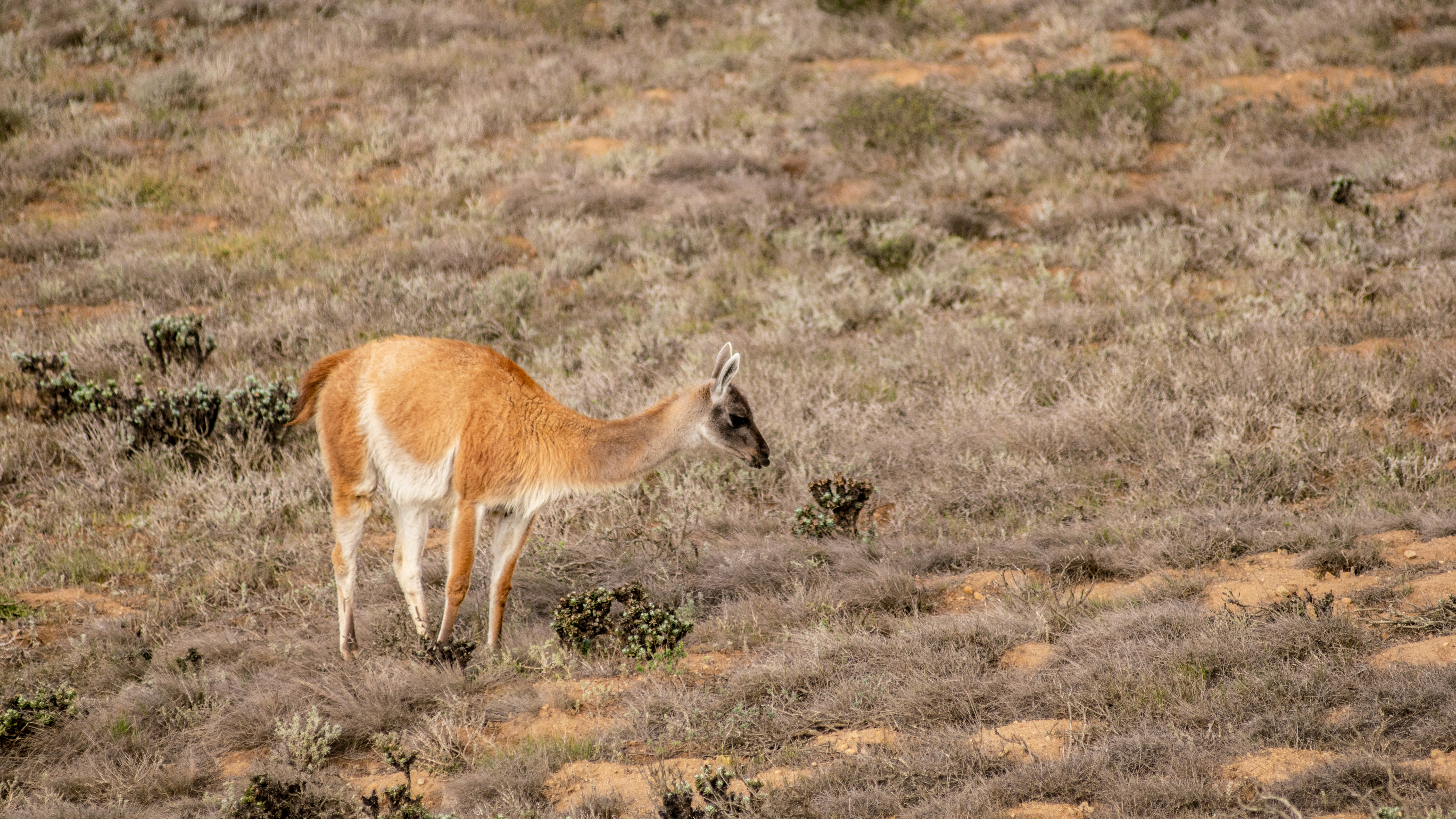 Guanaco en el Parque Nacional Bosque Fray Jorge, cerca del bosque húmedo en la zona más alta del parque